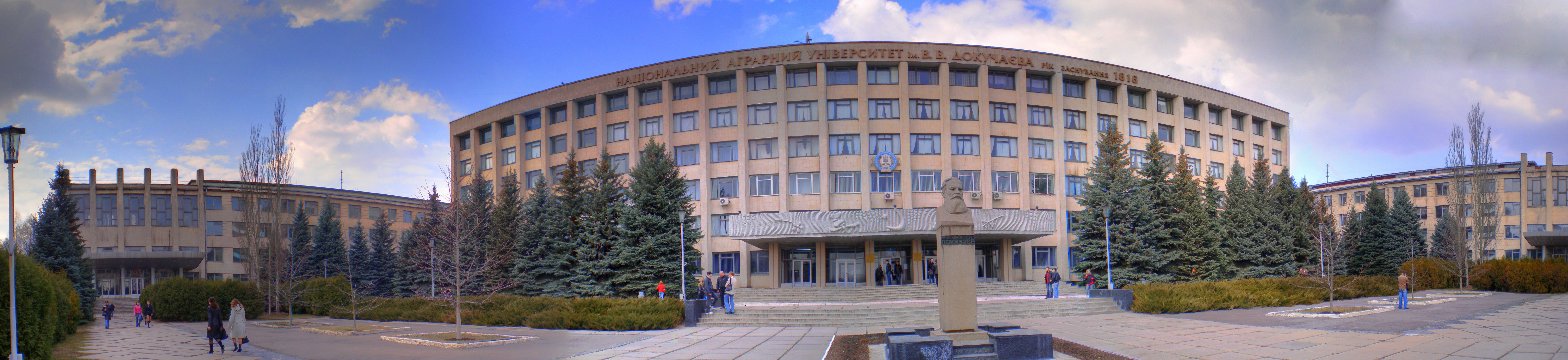 Харьковский аграрный университет. Панорама